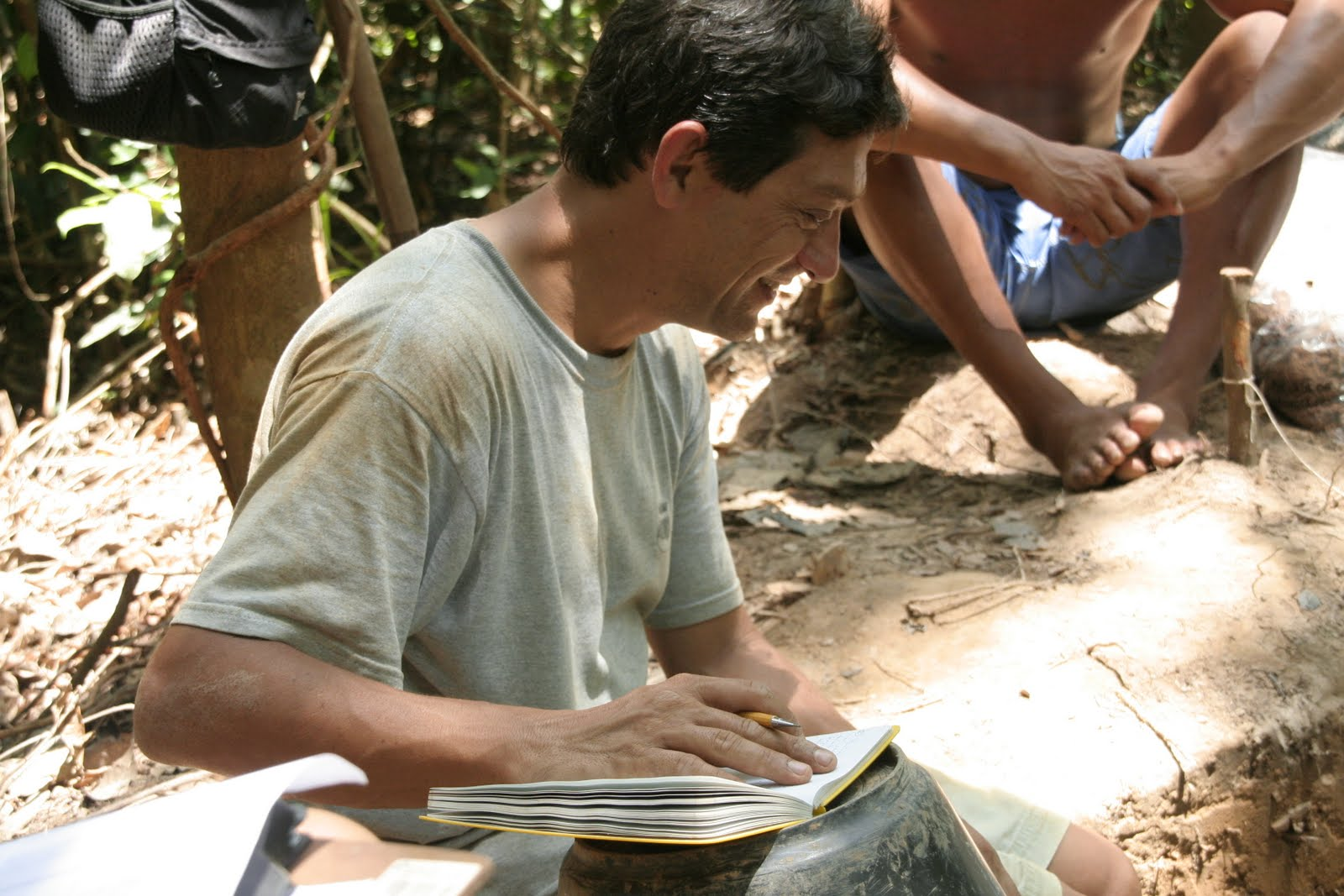 Eduardo Góes Neves durante uma escavação arqueológica no rio Unini, estado do Amazonas, Brasil.